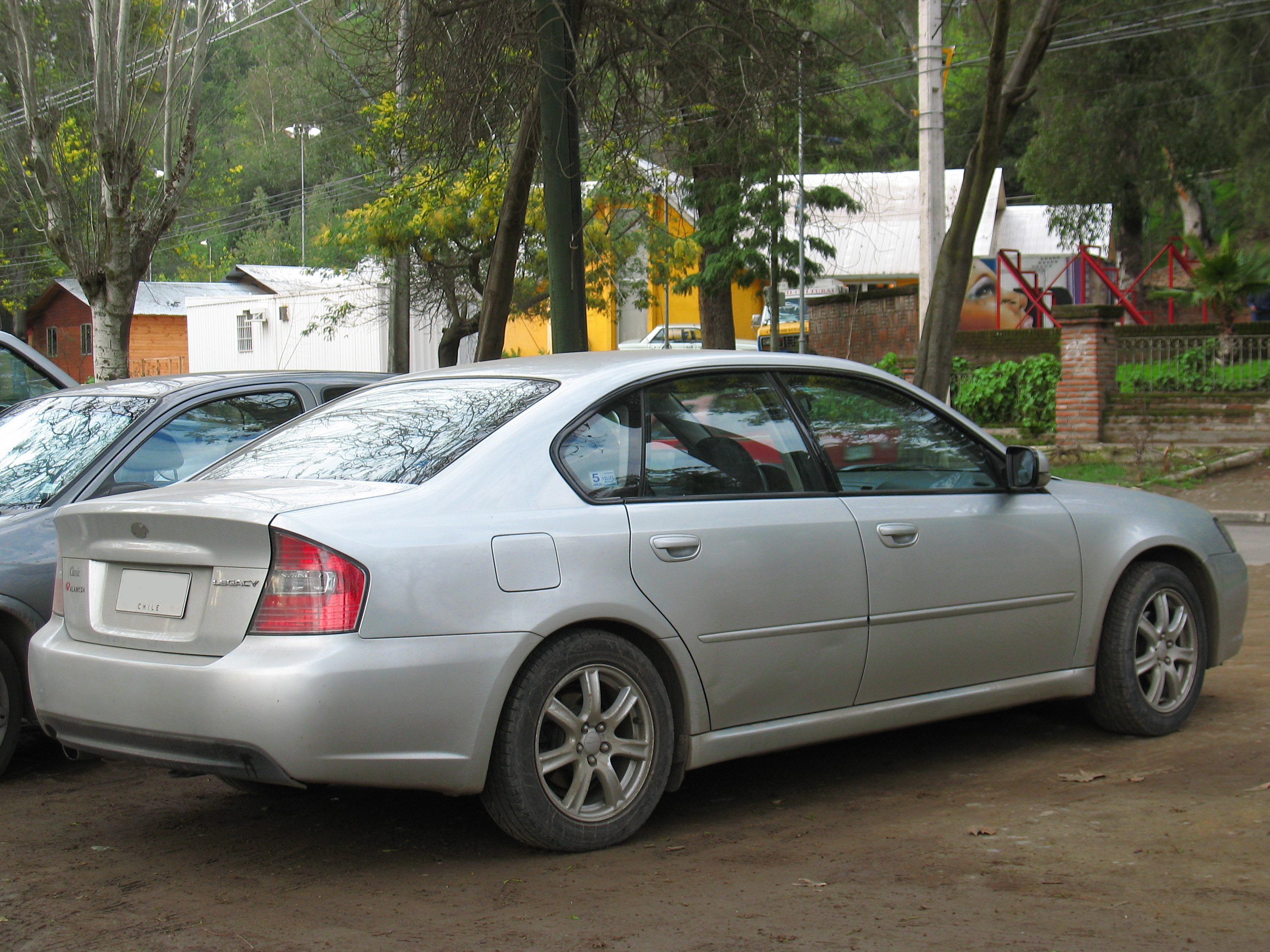 Subaru Legacy 2.0i 2004